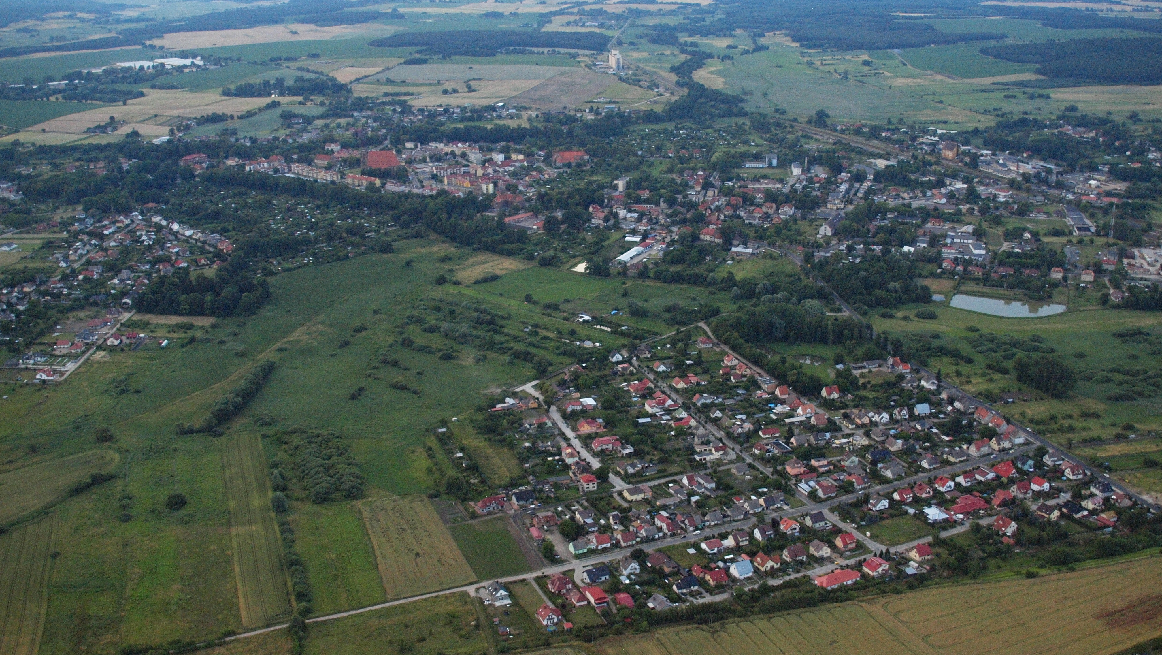 Chojna, Polen, Luftaufnahme (2015)